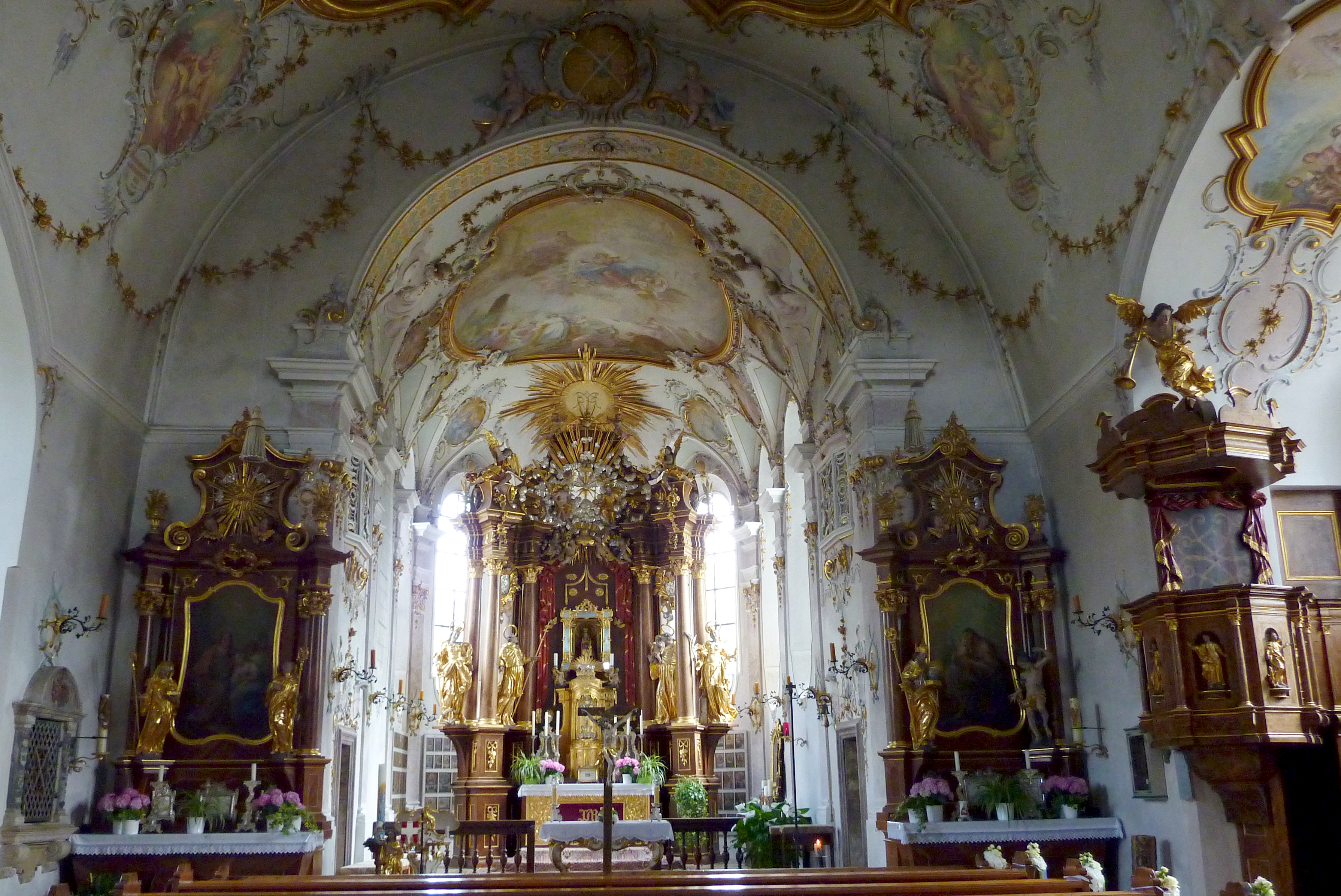 Katholische Wallfahrtskirche Mariä Himmelfahrt in Buggenhofen, einem Ortsteil von Bissingen im Landkreis Dillingen an der Donau (Bayern), Innenraum